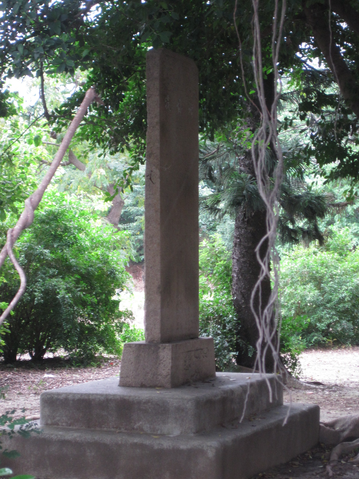 紀念臺灣知府蔣允焄築堤造橋事蹟而立之蔣公堤碑。